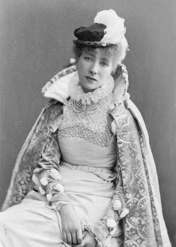 Sarah Bernhardt as Dona Sol in Hernani